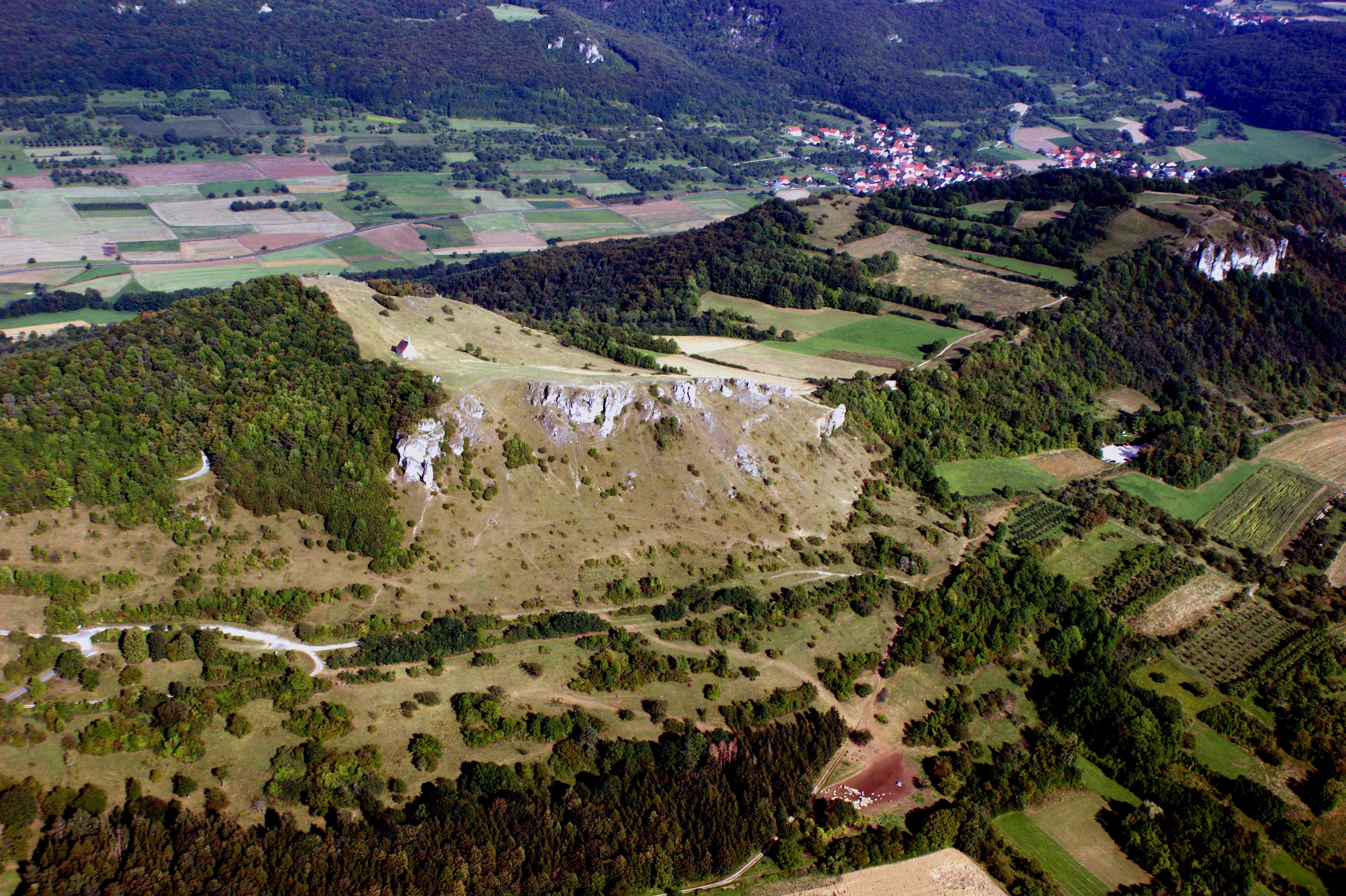 Luftbild Walberla im August 2009